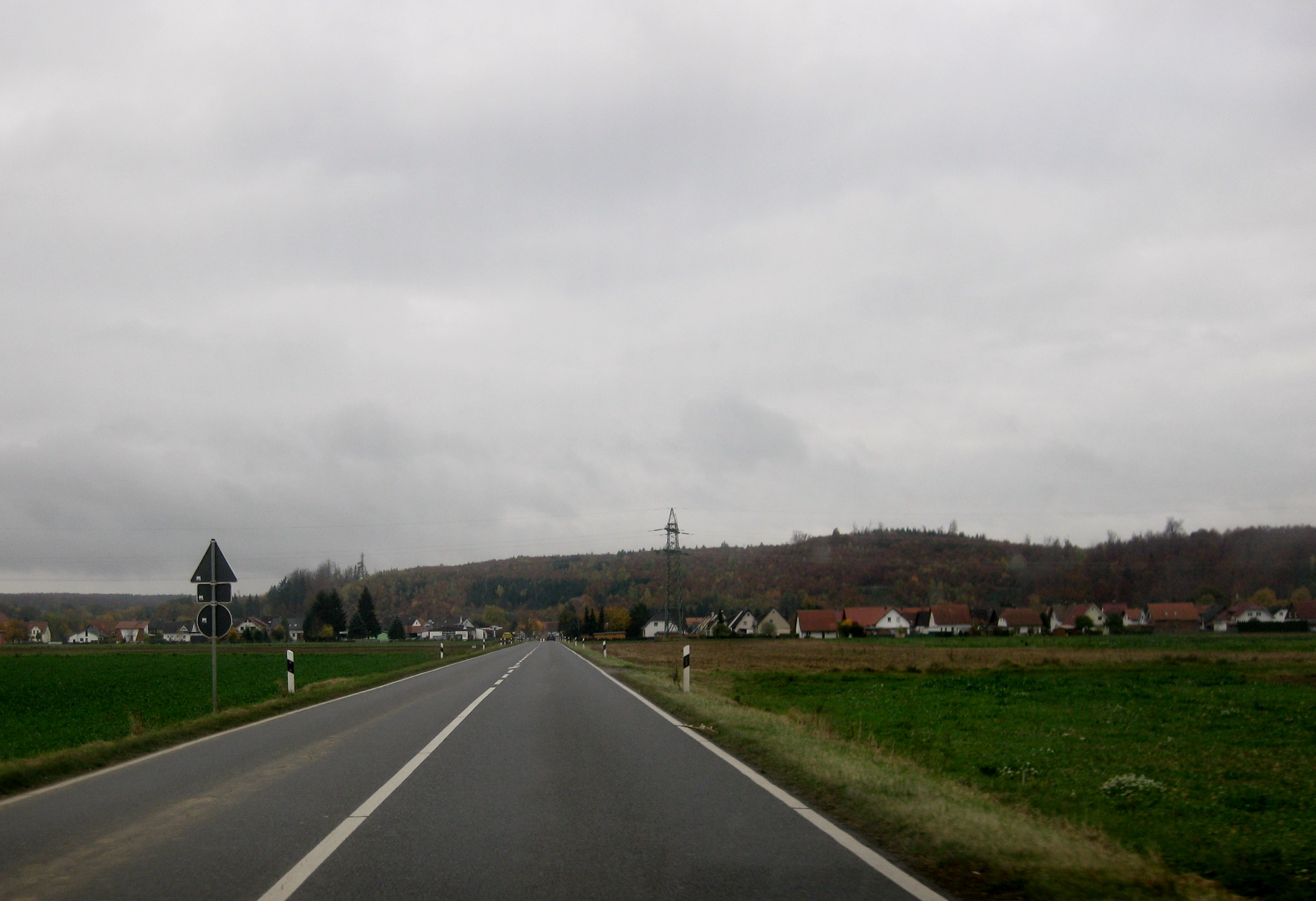 Ortsansicht Pöhlde von Norden